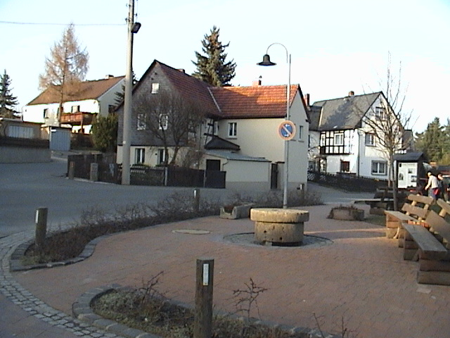 Dorfplatz in Braunichswalde, 17. März 2004. Steffen Mokosch